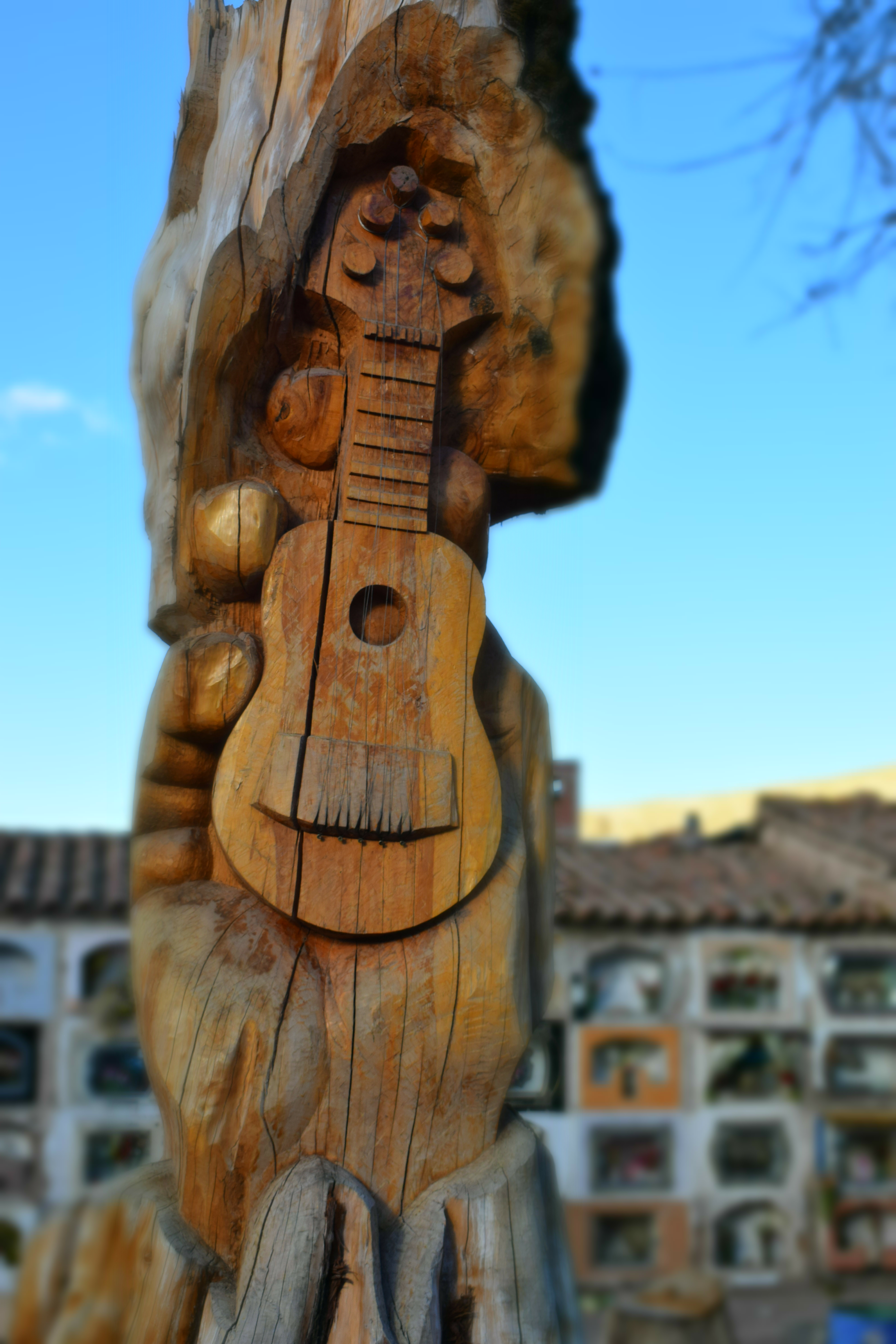 Cementerio General de Potosí This medium shows the protected monument with the number P/F0-001 in Bolivia.